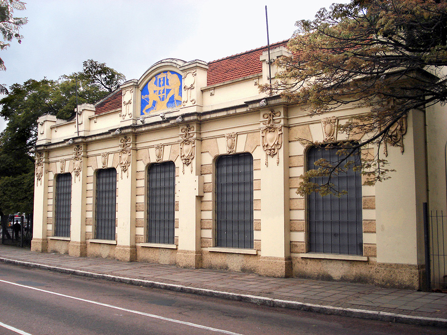 Museu da UFRGS, um prédio histórico da Universidade Federal do Rio Grande do Sul, Porto Alegre, Brasil.